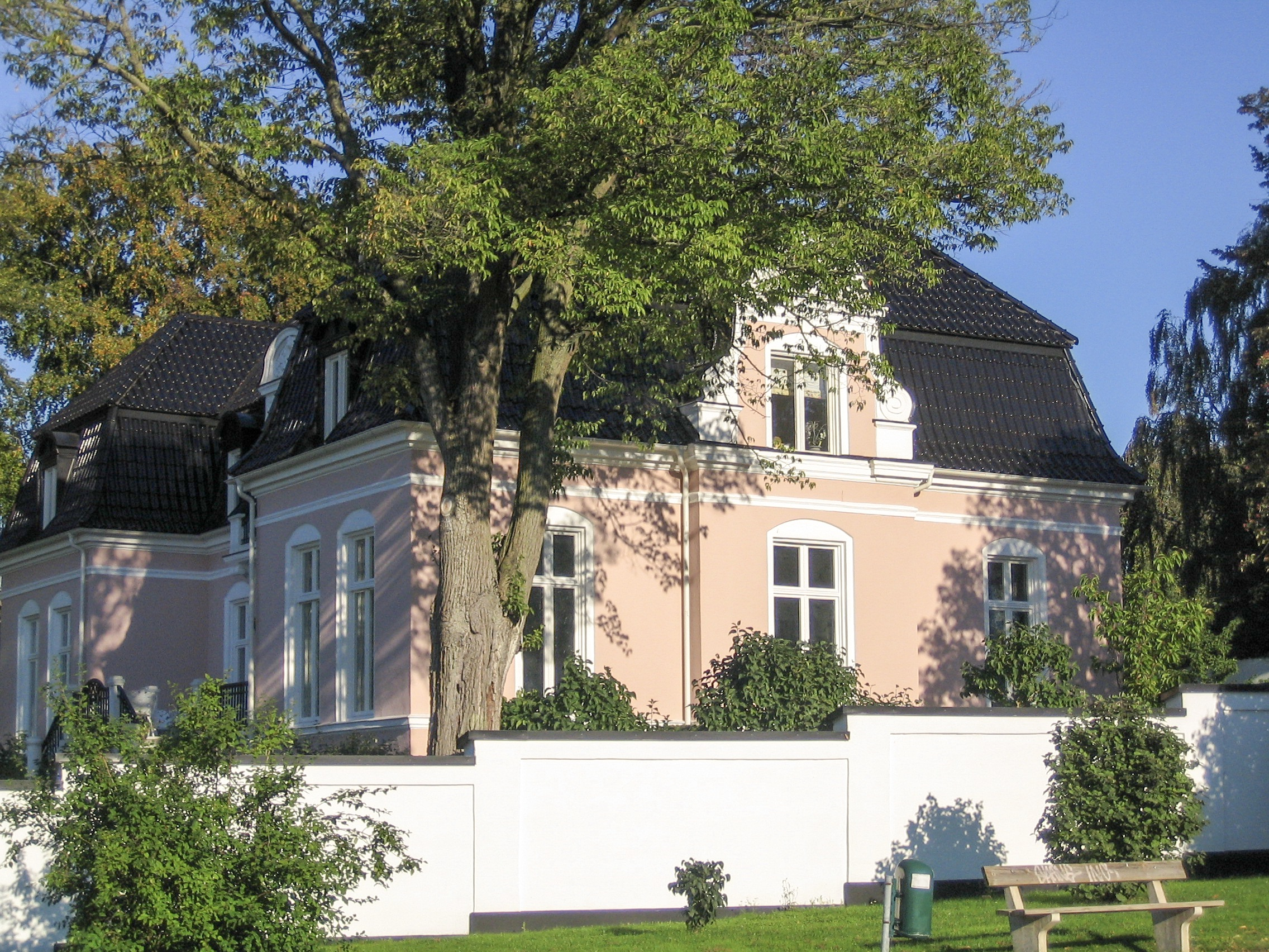 Fridhem, Malmö, Sweden